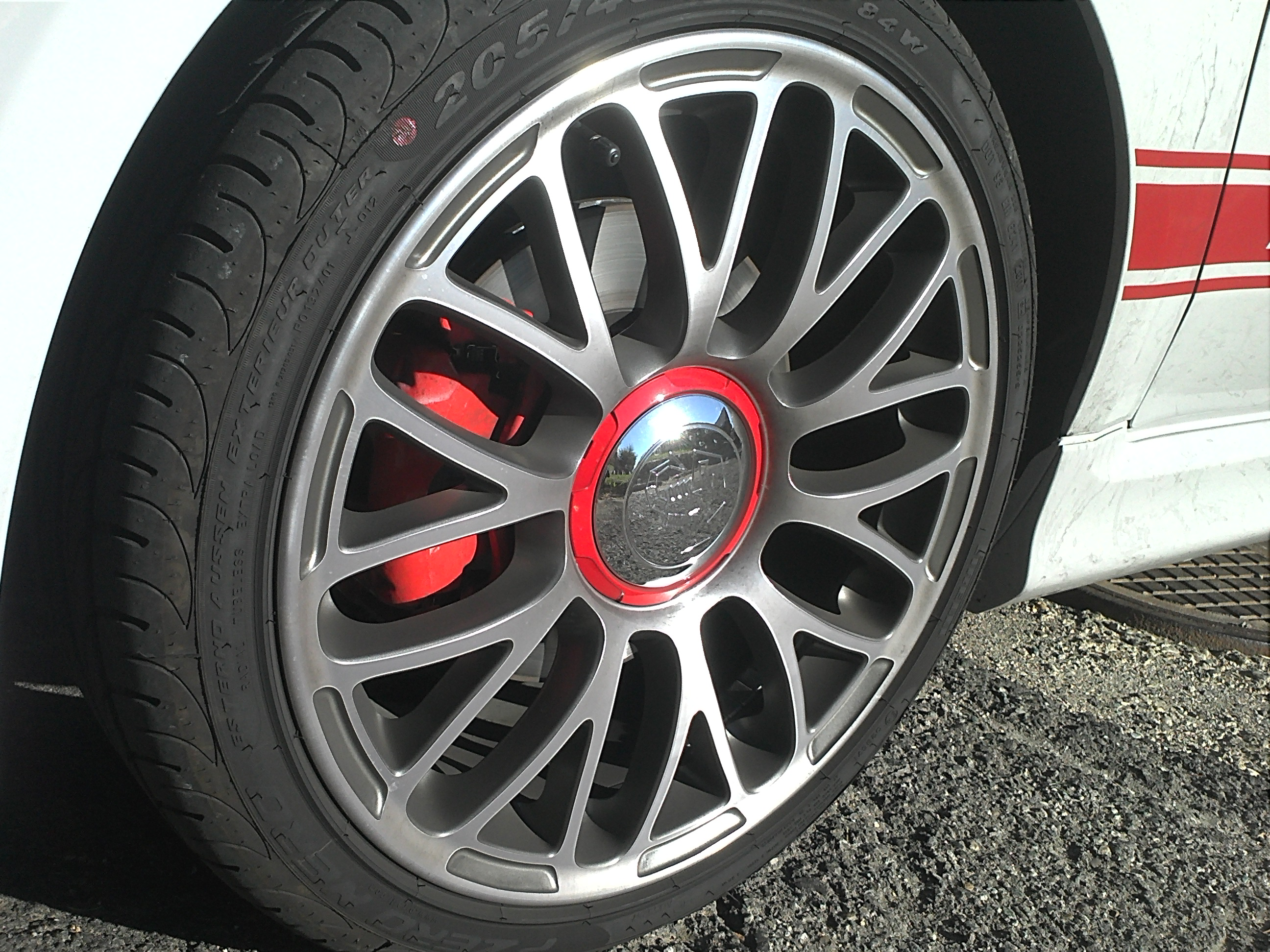 Abarth_500_base_freni